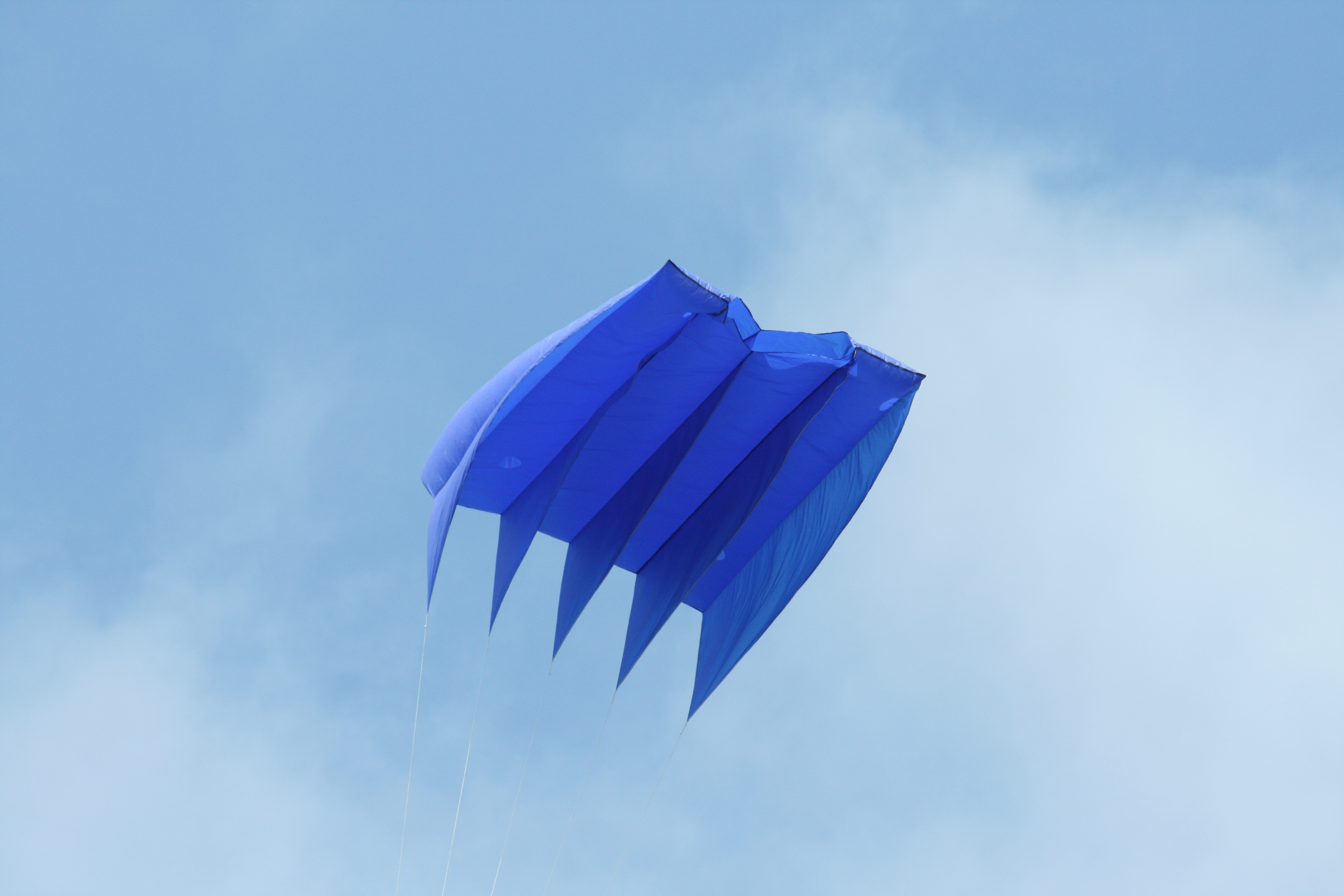 Brie-Comte-Robert, le 6 mai 2012, accueille les 24h internationales du cerf-volant.